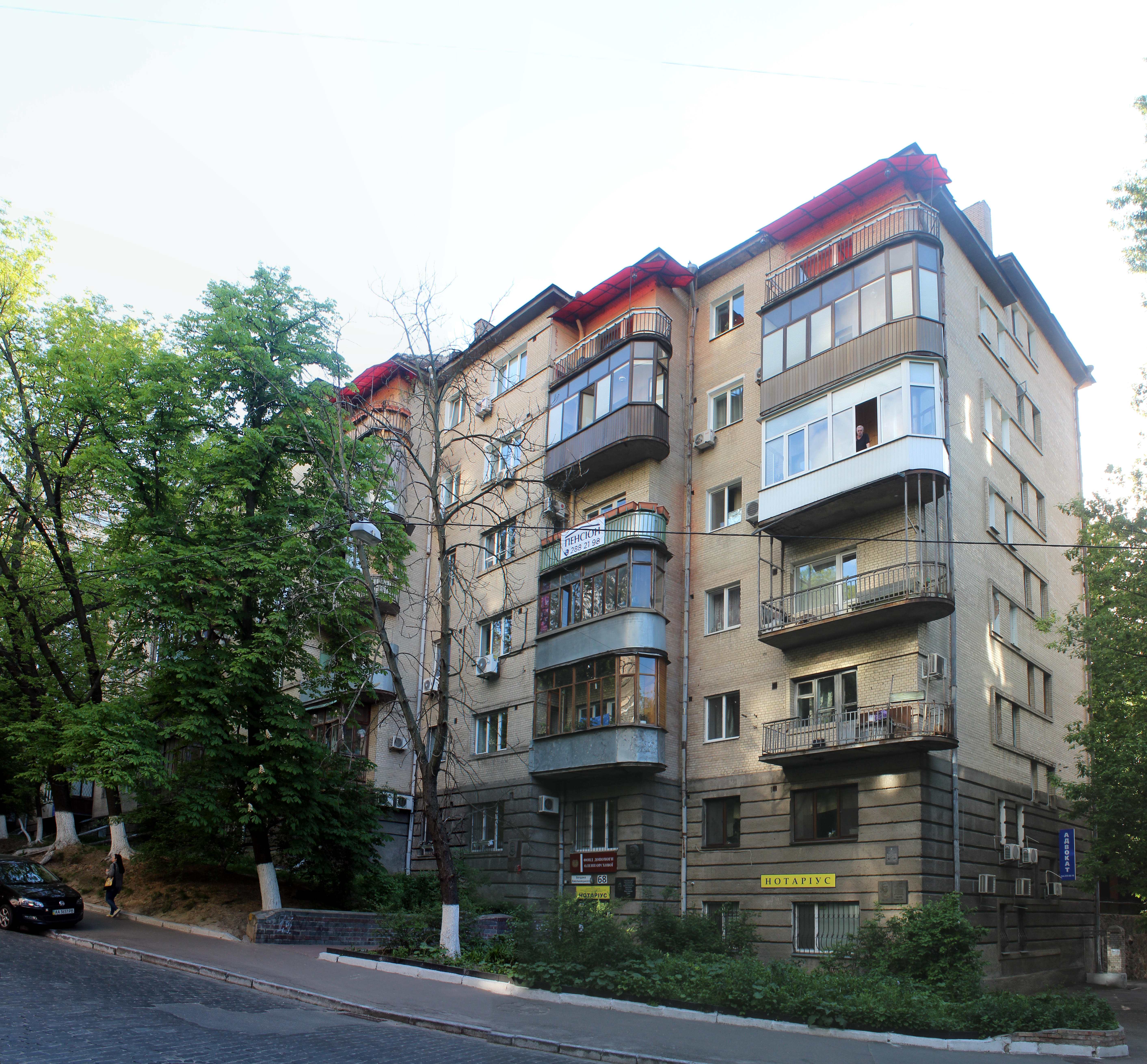 Будинок житловий літераторів «Роліт», в якому мешкали відомі письменники та митці, Київ, Хмельницького Богдана вул., 68/2